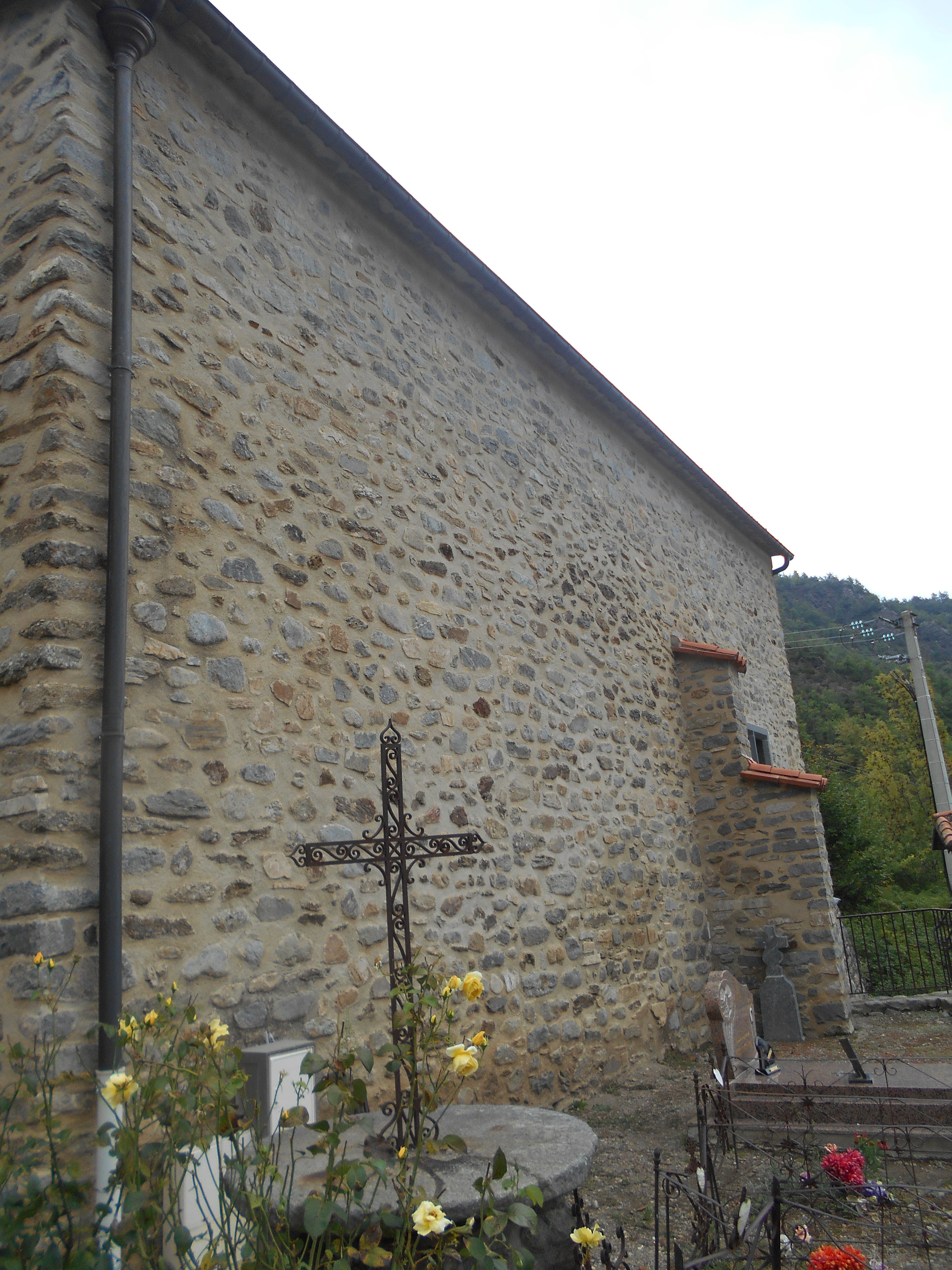 Església parroquial de Sant Vicenç de Vallmanya